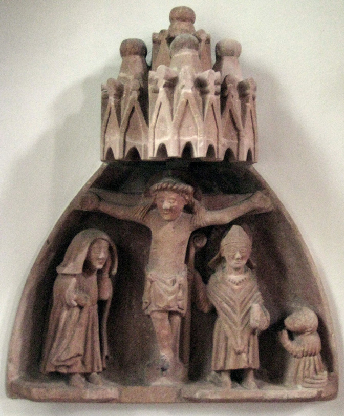 Portal der Kirche in Geiß-Nidda